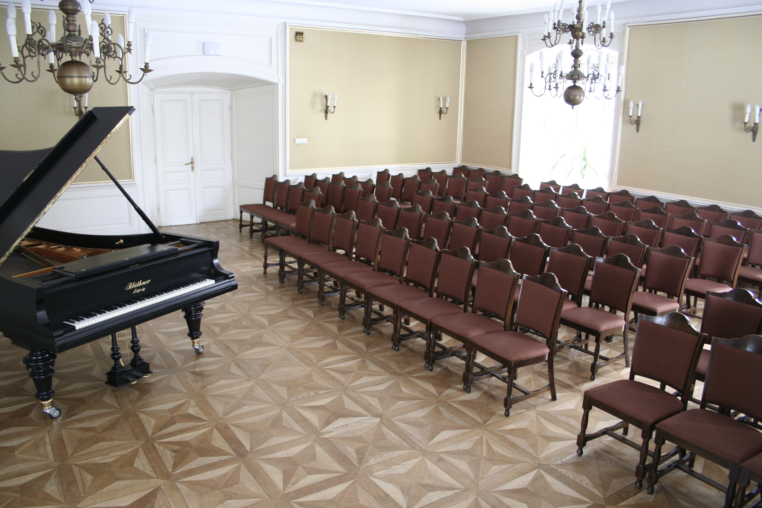 Dworek Białoprądnicki-sala kominkowa. foto: Radosław Molski